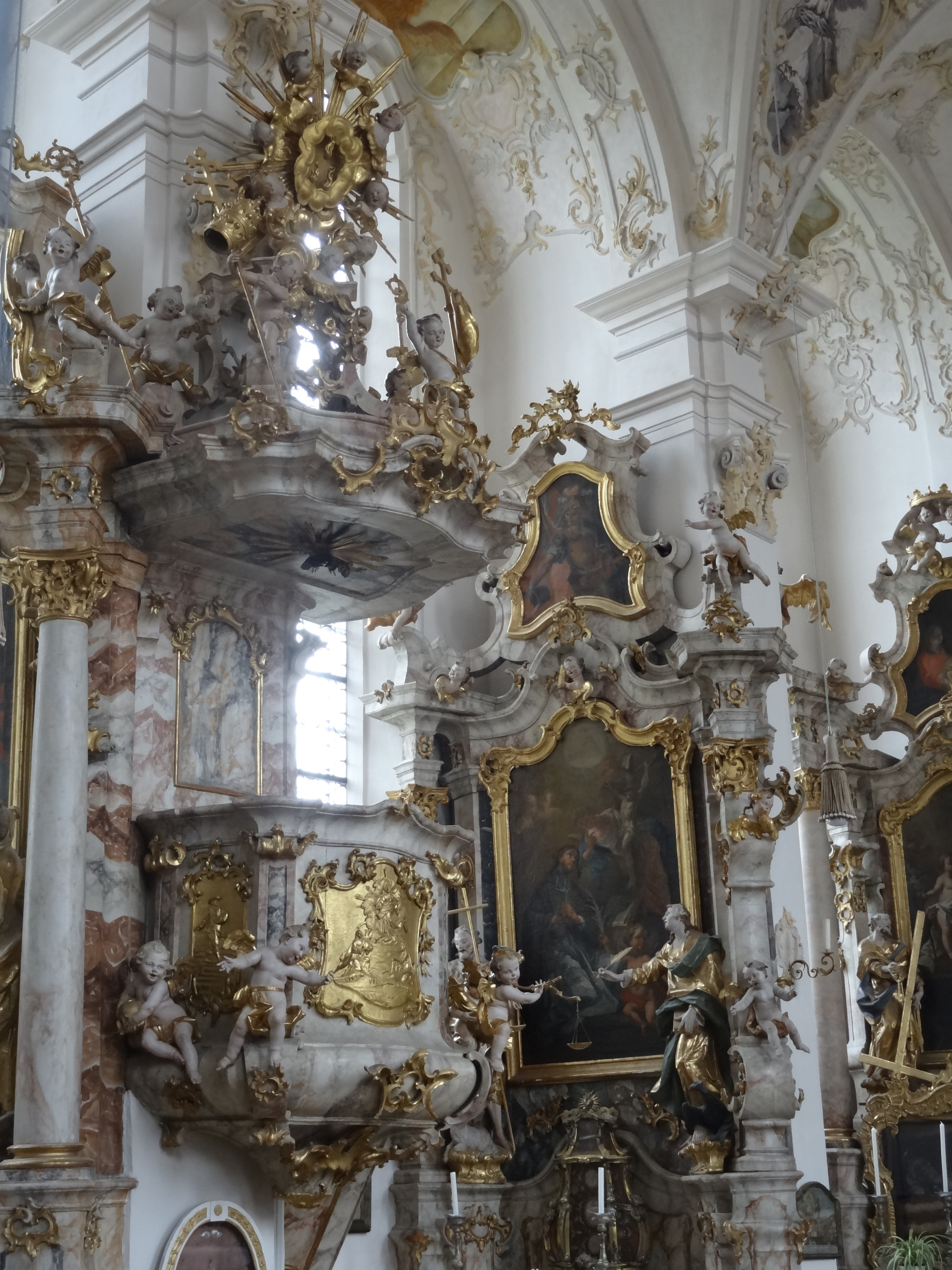 Kanzel der Wallfahrtskirche Mariä Himmelfahrt in Maria Thalheim (Gde. Fraunberg, Lkr. Erding)